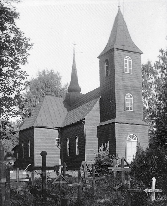 Кирха прихода Каприо в деревне Новосёлки (Ломоносовского района).